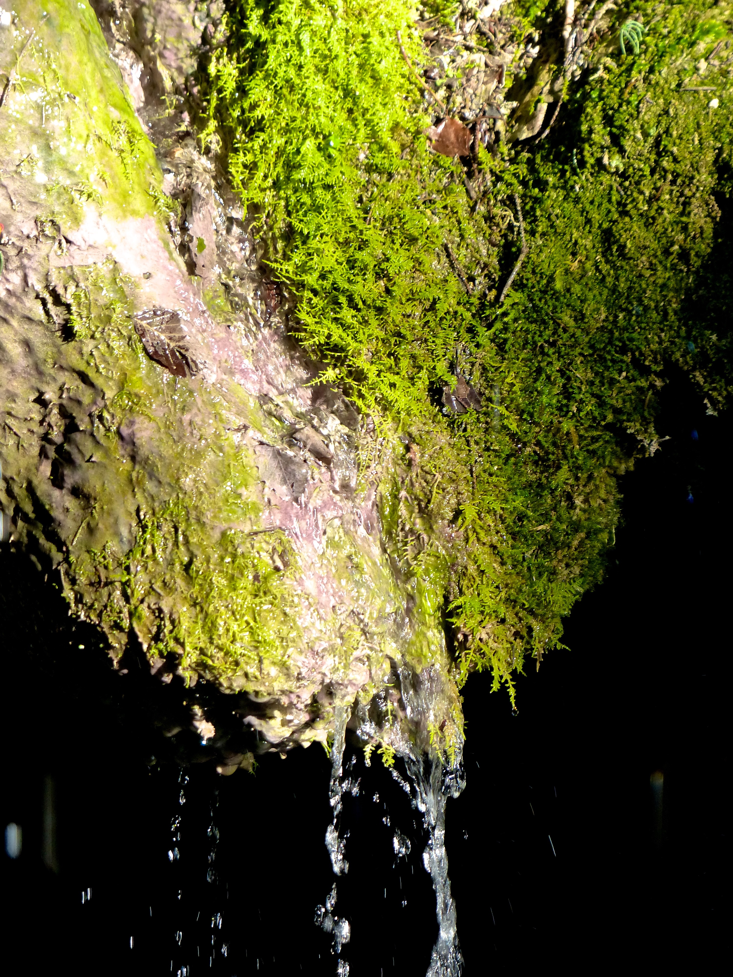 Geotop Wasserfall Hinang: eiszeitliche Terrassenkante am Hinanger Wasserfall: Kalktuffnase